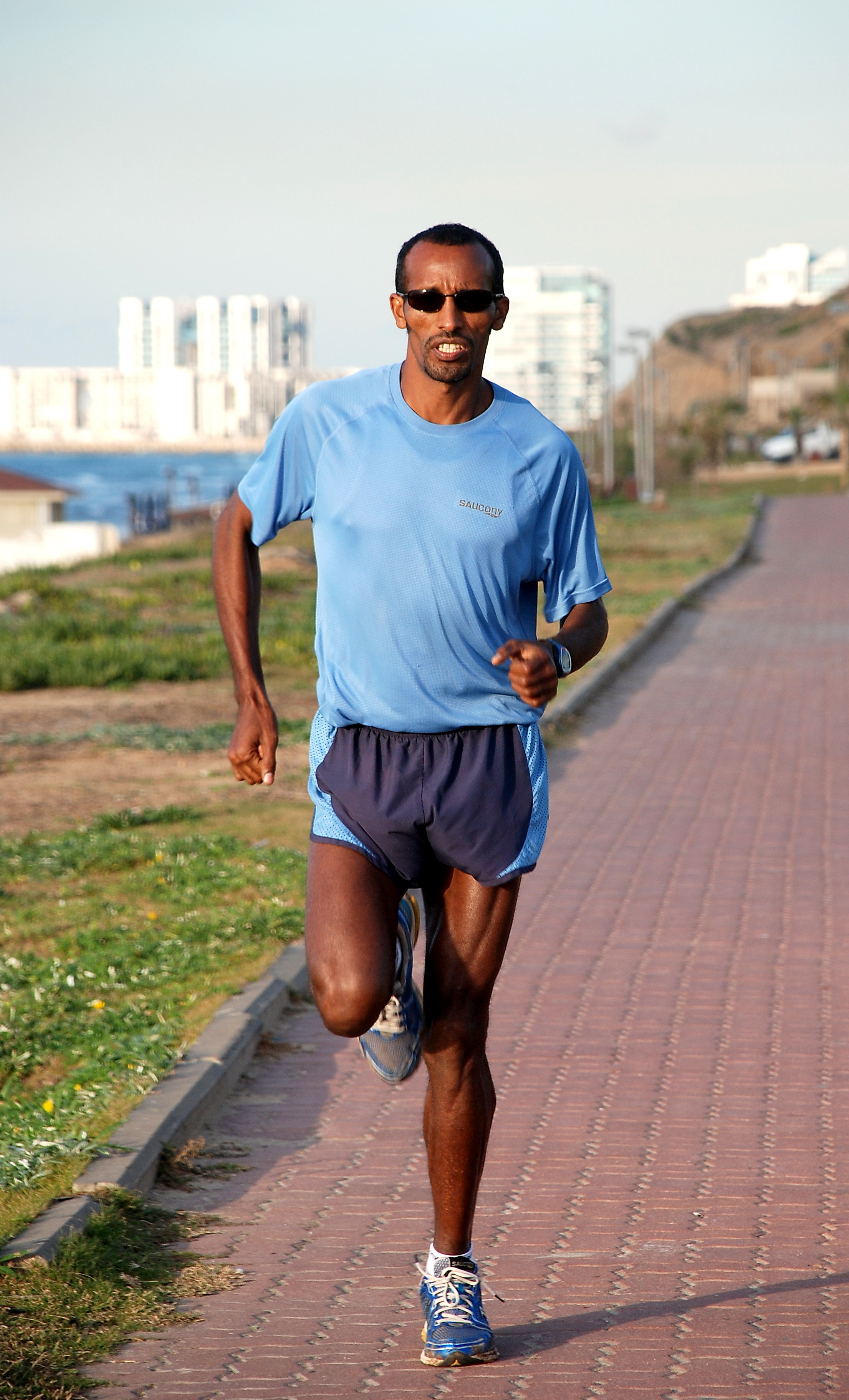 גזצ'או יוסף